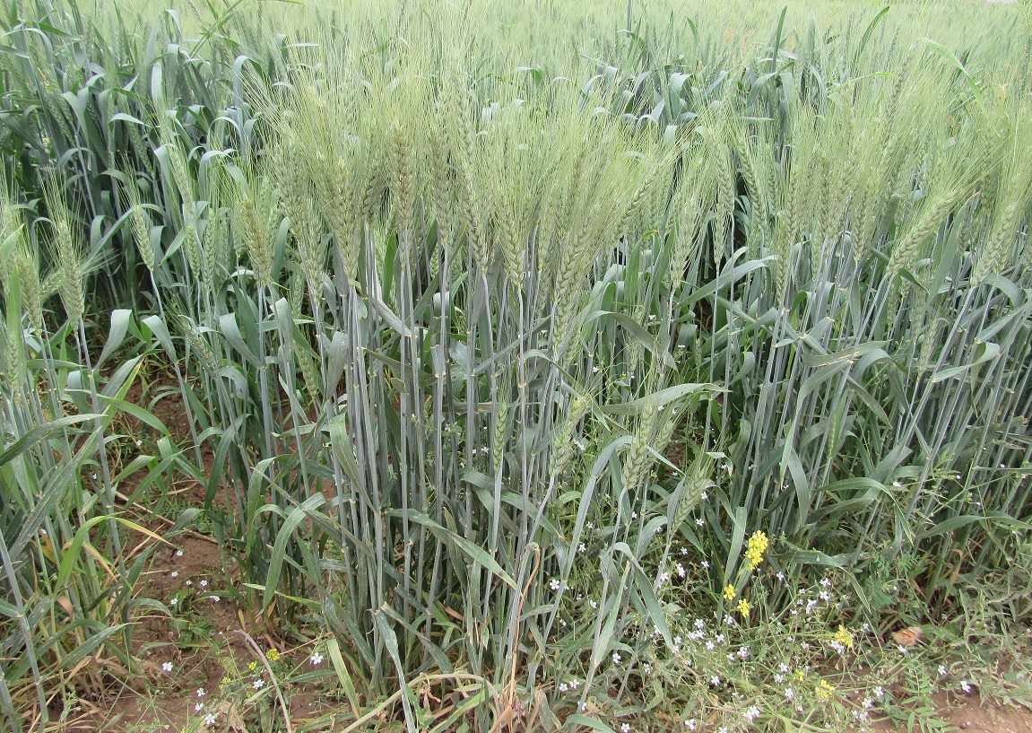 گندم از مهمترین محصولات روستای راوخ